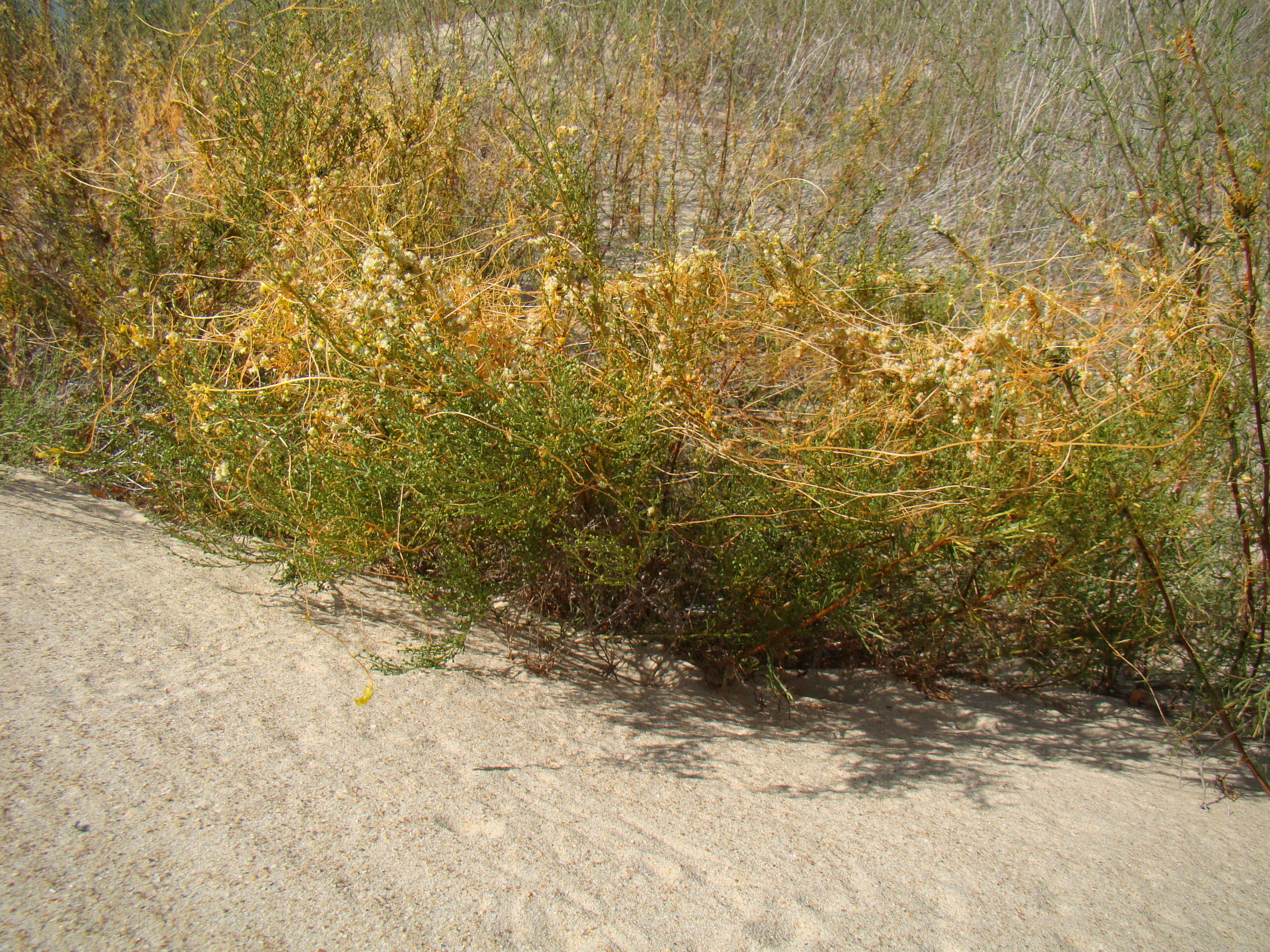 Село Витязево, муниципальное образование город-курорт Анапа, Краснодарский край, Россия. Повилика (Cuscuta).